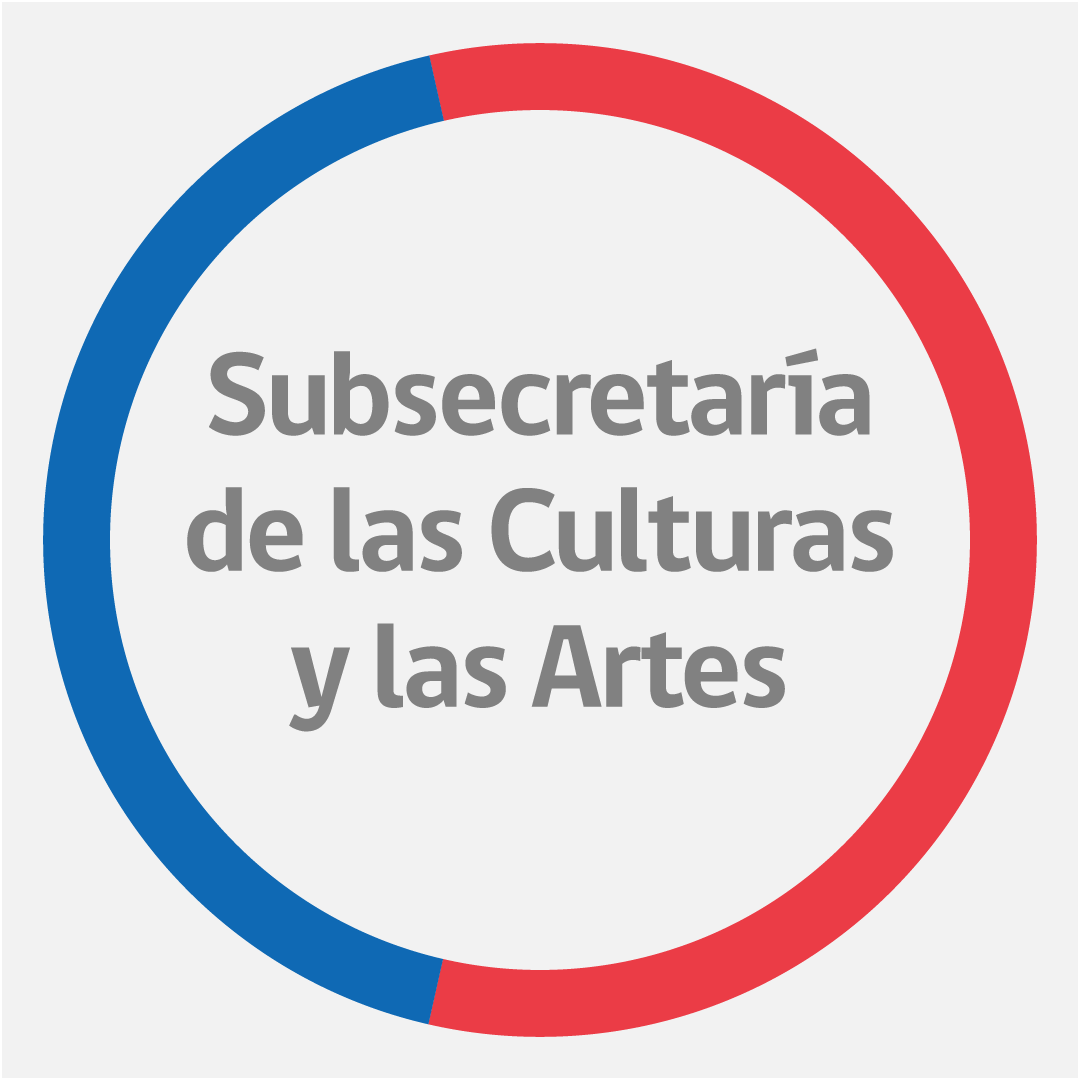 Logo de la Subsecretaría de las Culturas y las Artes de Chile